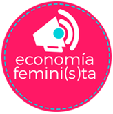 Isologotipo de Economía Feminista